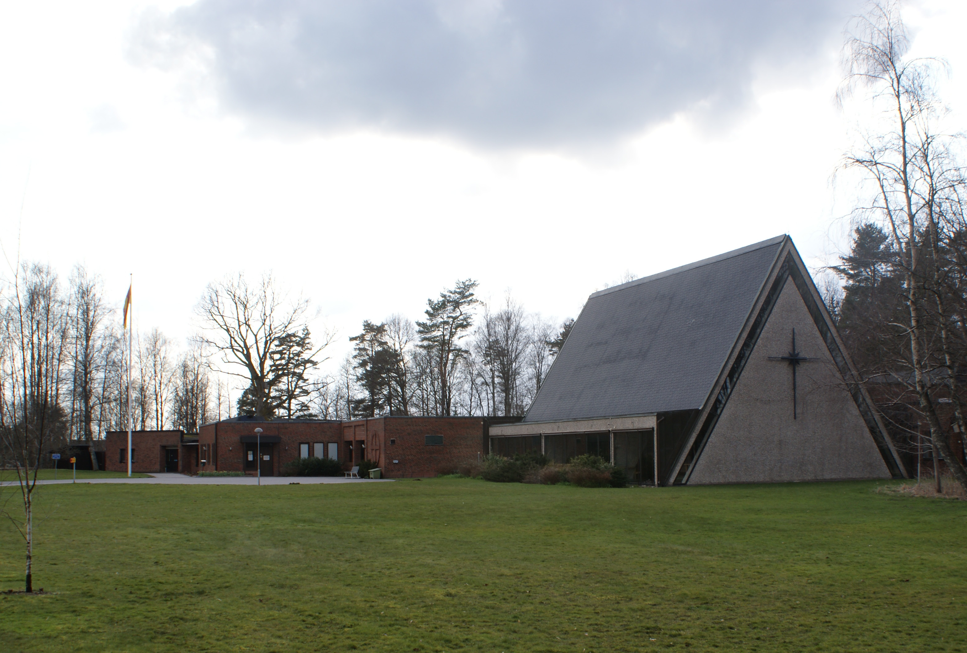 Lextorpskyrkan i Trollhättan